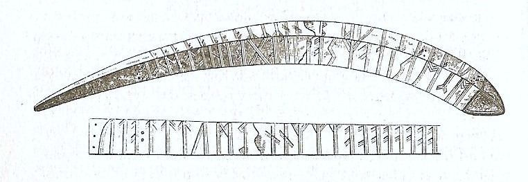 Lindholmenamuletten, en runristad amulett av ben från 500-talet e.Kr. funnen i Lindholmen i Skåne. DR 261.